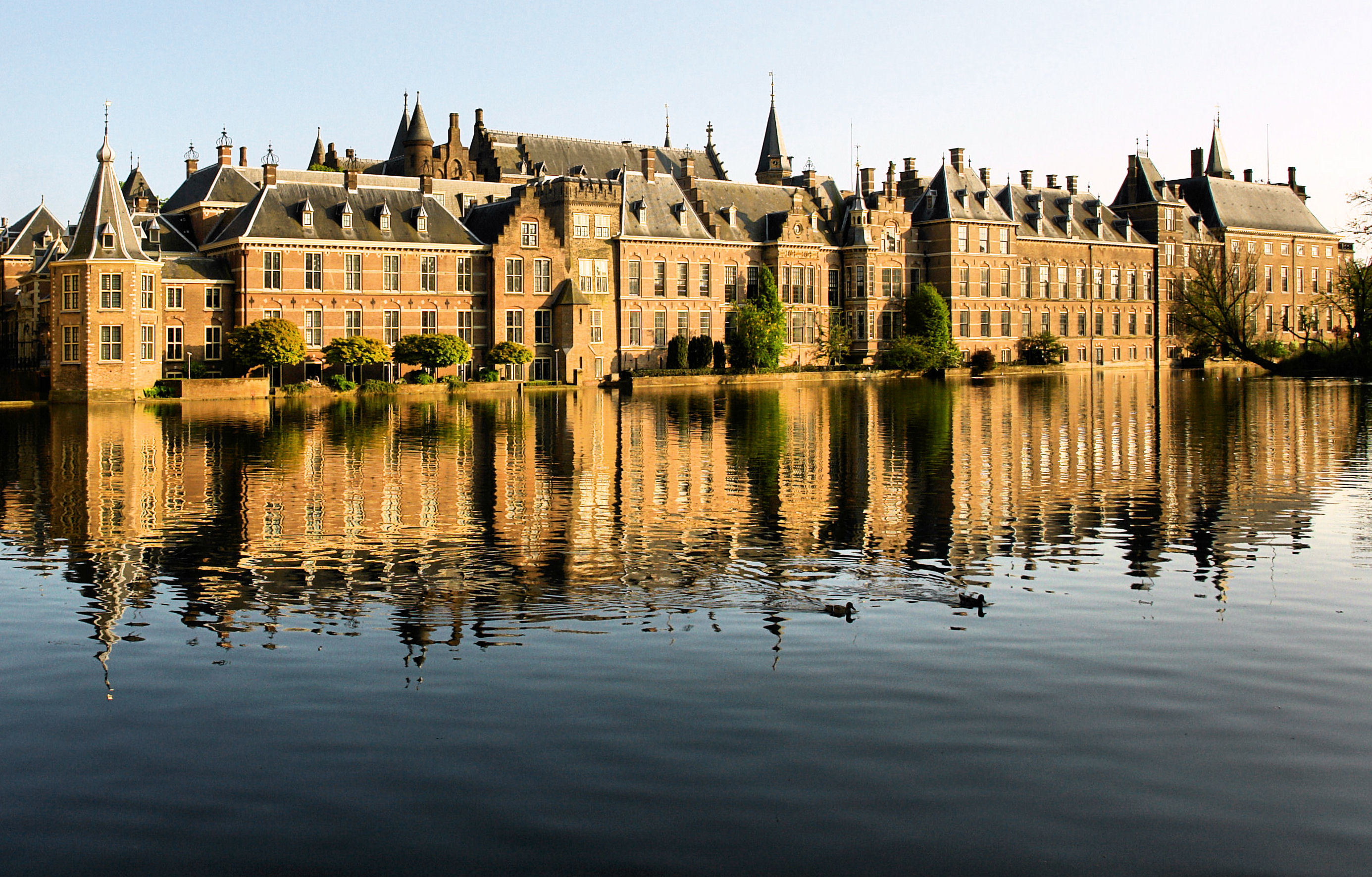 Binnenhof, Den Haag, Netherlands